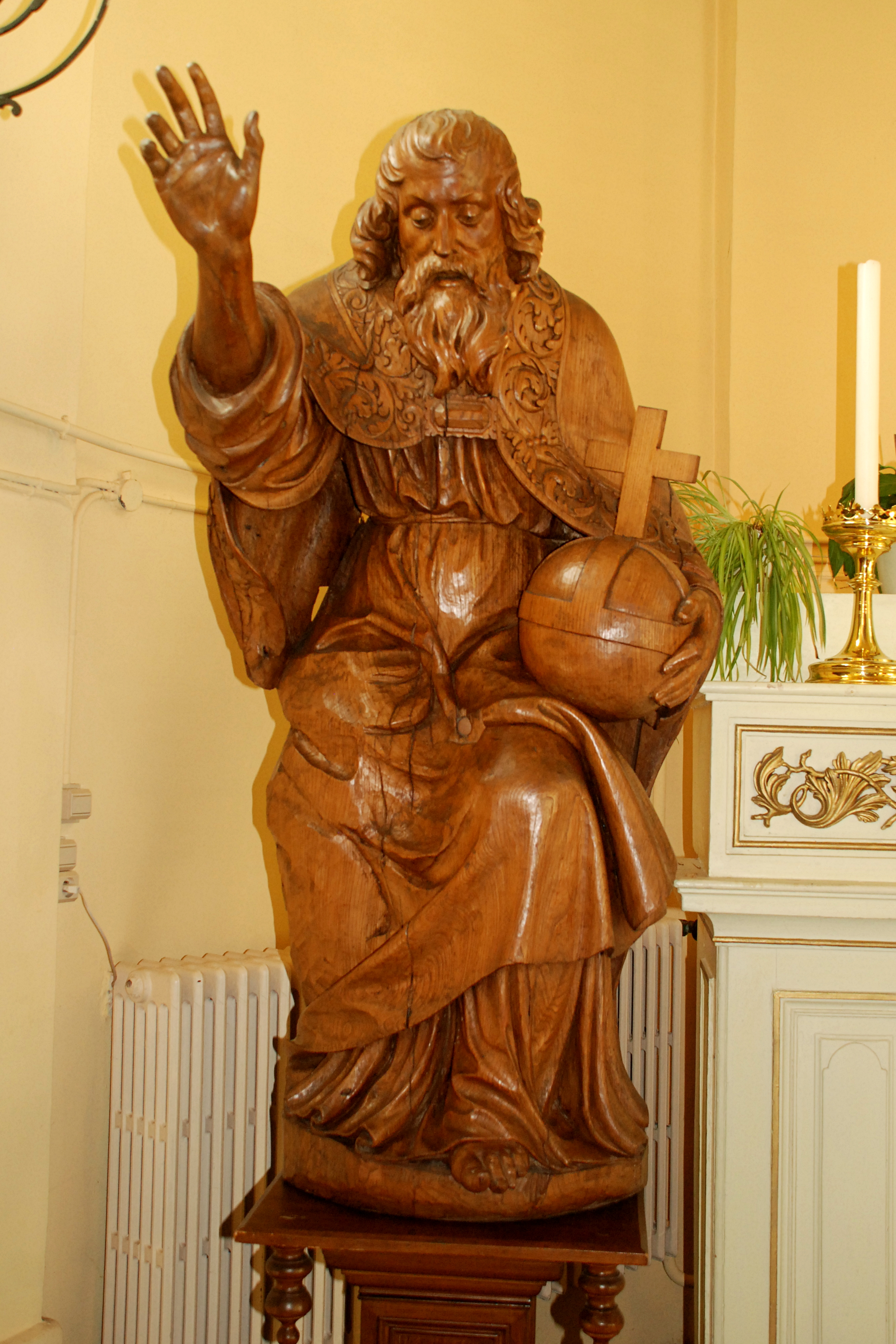 Belgique - Brabant wallon - Mont-Saint-Guibert - Église Saint-Guibert - statuaire baroque provenant de l'ancienne église des Augustins de Bruxelles (désacralisée en 1842)